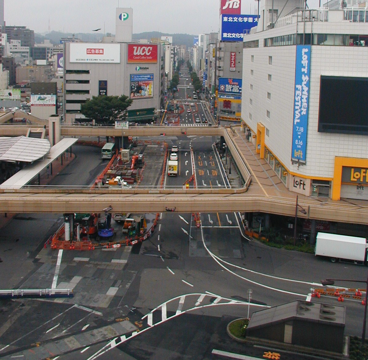 JR仙台駅屋上駐車場から撮影した南町通